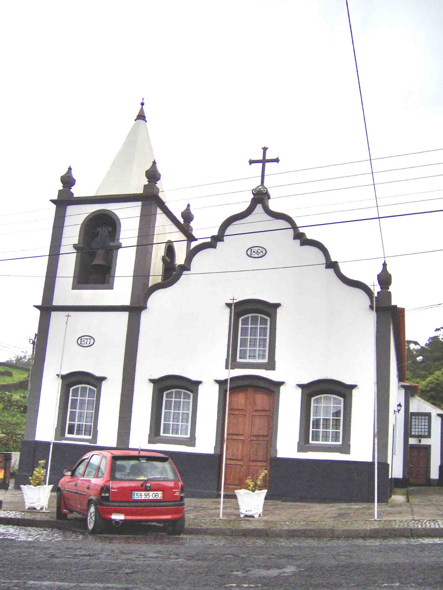 Igreja de Nossa Senhora da Consolação da Feteira, ilha Terceira, Açores, Portugal